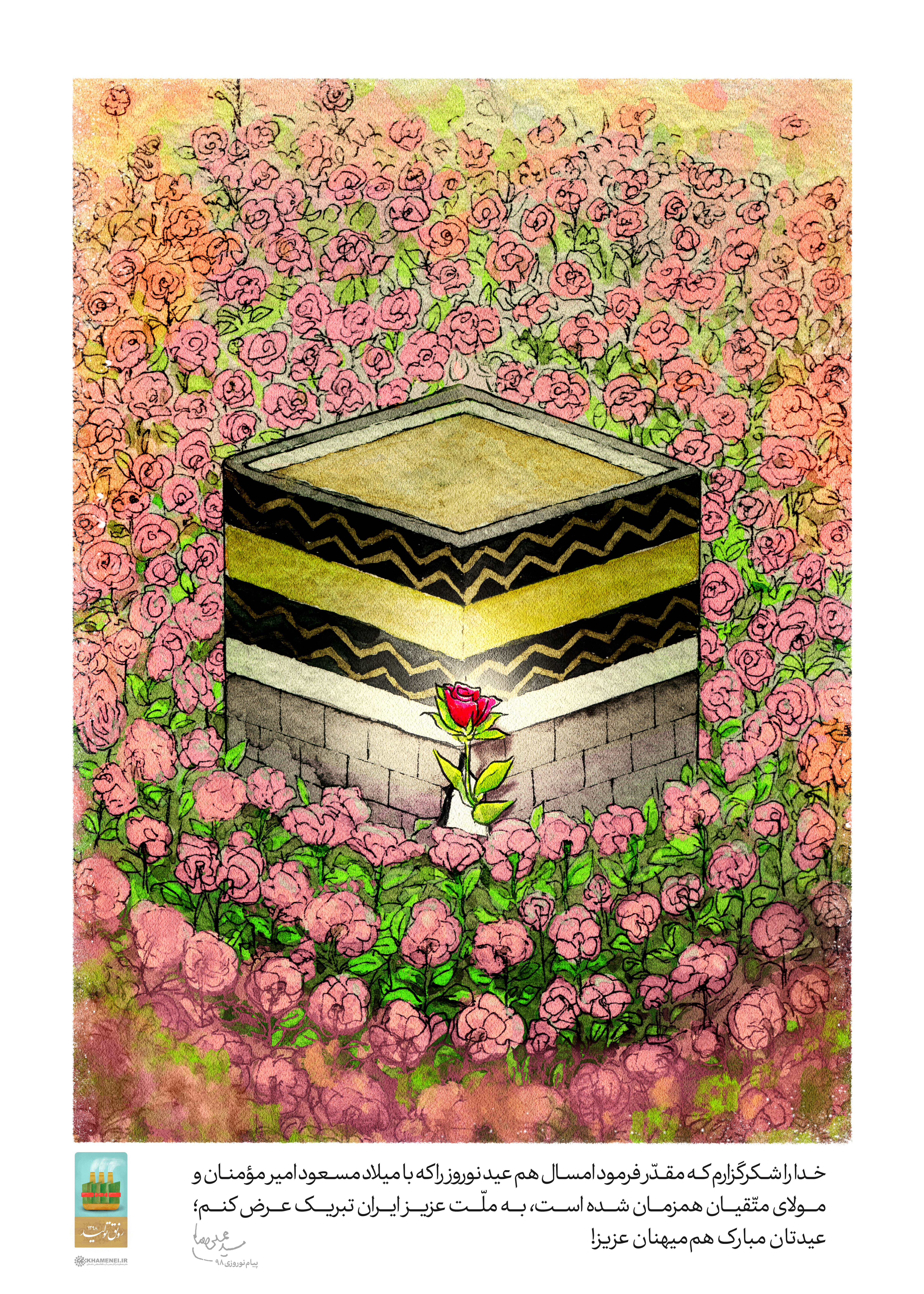 نوروز حقیقی، طرحی برای همزمانی تولد علی بن ابی‌طالب با آغاز سال ۱۳۹۸